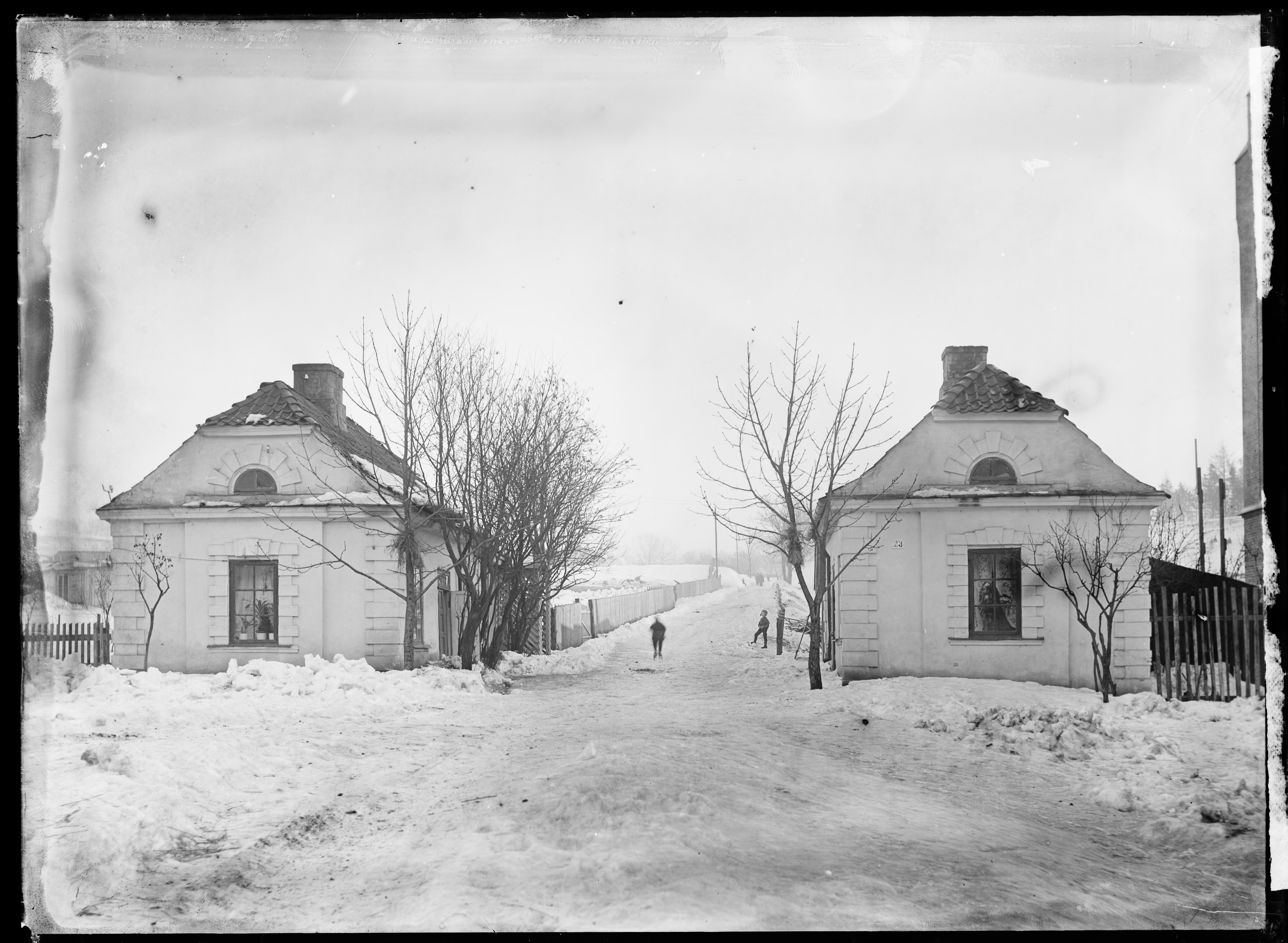 Bildet er hentet fra Nasjonalbibliotekets bildesamling. Anmerkninger til bildet var: Påskrift arkivark: Portnerstuene i Thronhjemsveien Eldste arkivnummer: 272 Yngre arkivnummer: 53, 22 Oslo,Tøyen, Oslo, Oslo